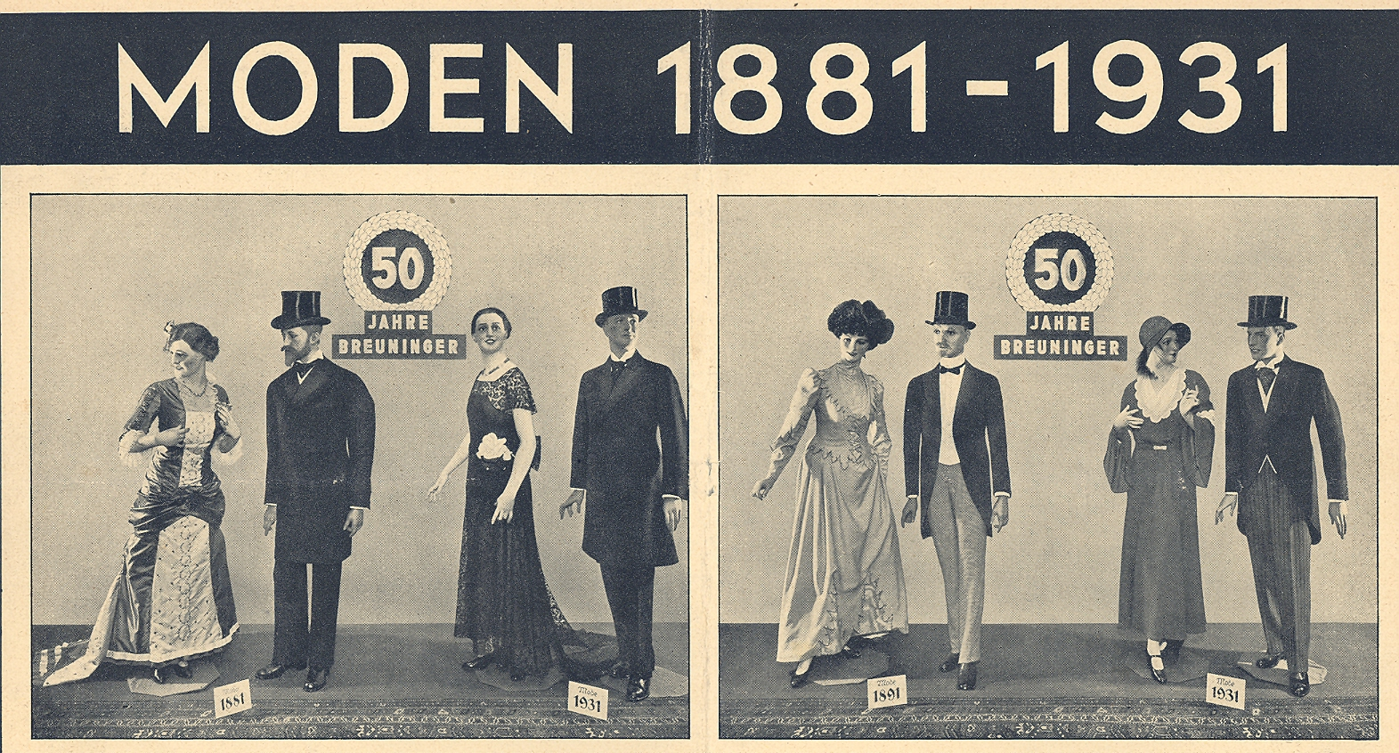 Бройнингеру - 50 лет, 1929 год